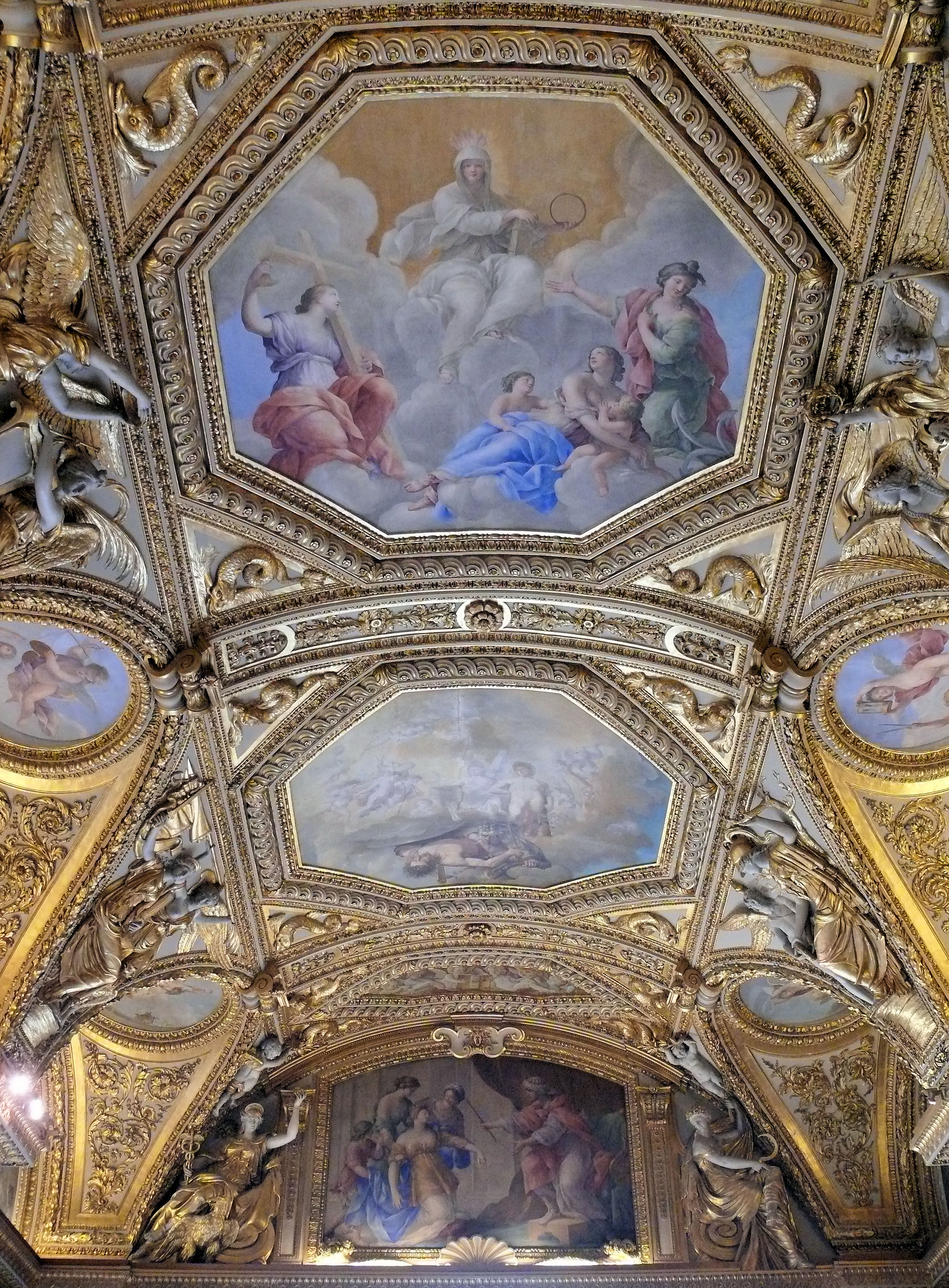 Palais du Louvre - Appartements d'été de la reine Anne d'Autriche - Salle 26 - La salle actuelle a été obtenue en regroupant en 1800 la chambre de parade et le petit cabinet de la Reine - L'architecte a reporté à l'extrémité sud de la nouvelle salle le décor du mur sud de la chambre de la reine. Le décor a été réalisé en 1658 par le peintre Giovanni Francesco Romanelli et le sculpteur Michel Angier. Il évoque les vertus de la reine en reprenant des scènes bibliques : Judith et Holopherne et Ester et Assuérus. Sur la voûte, Romanelli a peint La Religion et les vertus théologales. En 1800, le peintre Pierre Peyron peint les lunettes et médaillons d'allégories relatives aux arts. Pour assurer la continuité du décor de la voûte, le peintre Philippe-Auguste Hennequin réalise l' Hercule français. Claude Dejoux réalise les stucs qui faire les raccords nécessaires.